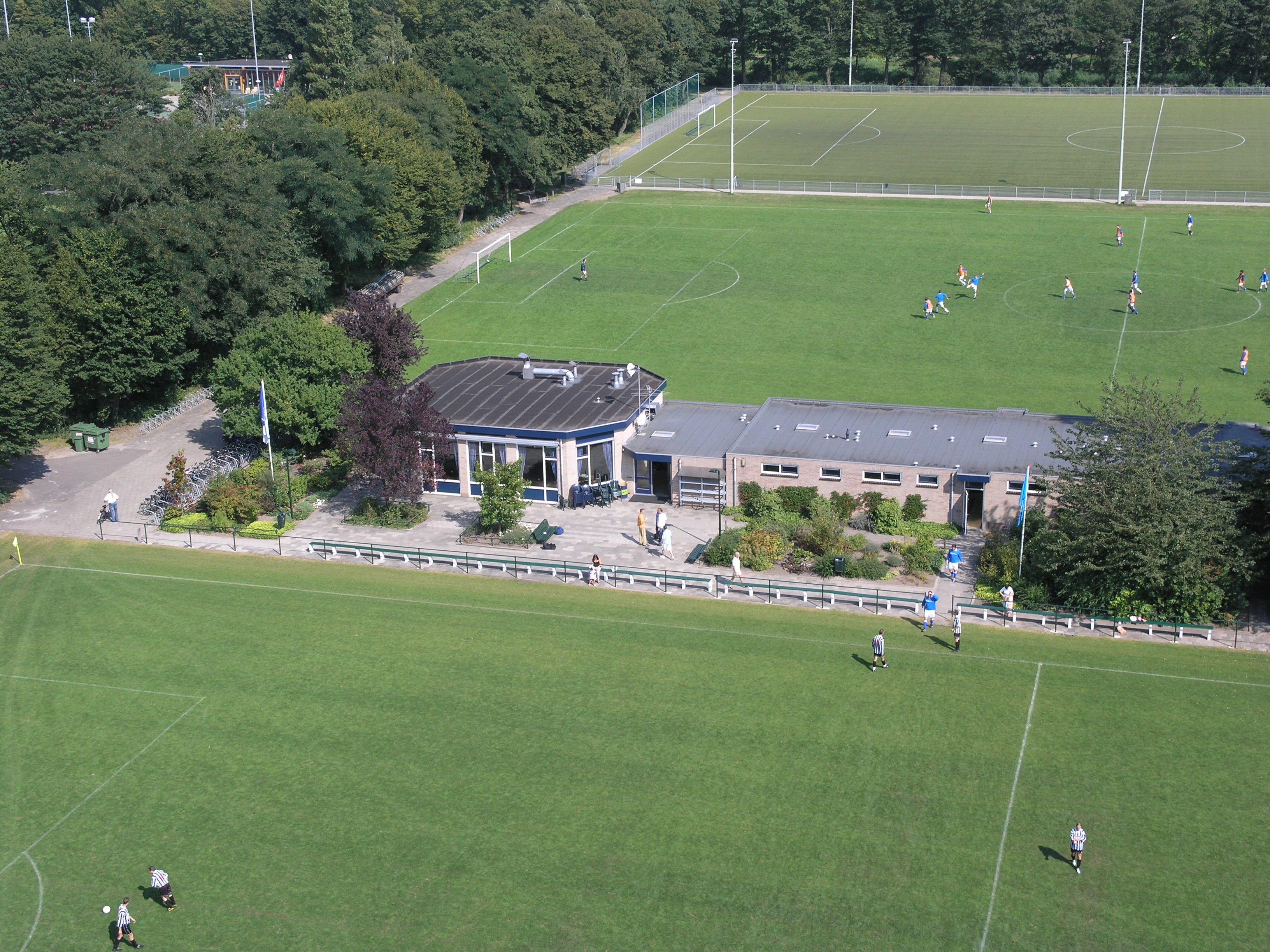 Het huidige complex op Sportpark Middenmeer. Deze luchtfoto is genomen door een fotograaf van onze voetbal vereniging (WV-HEDW (Wilhelmina Vooruit Hortus Eendracht Doet Winnen))